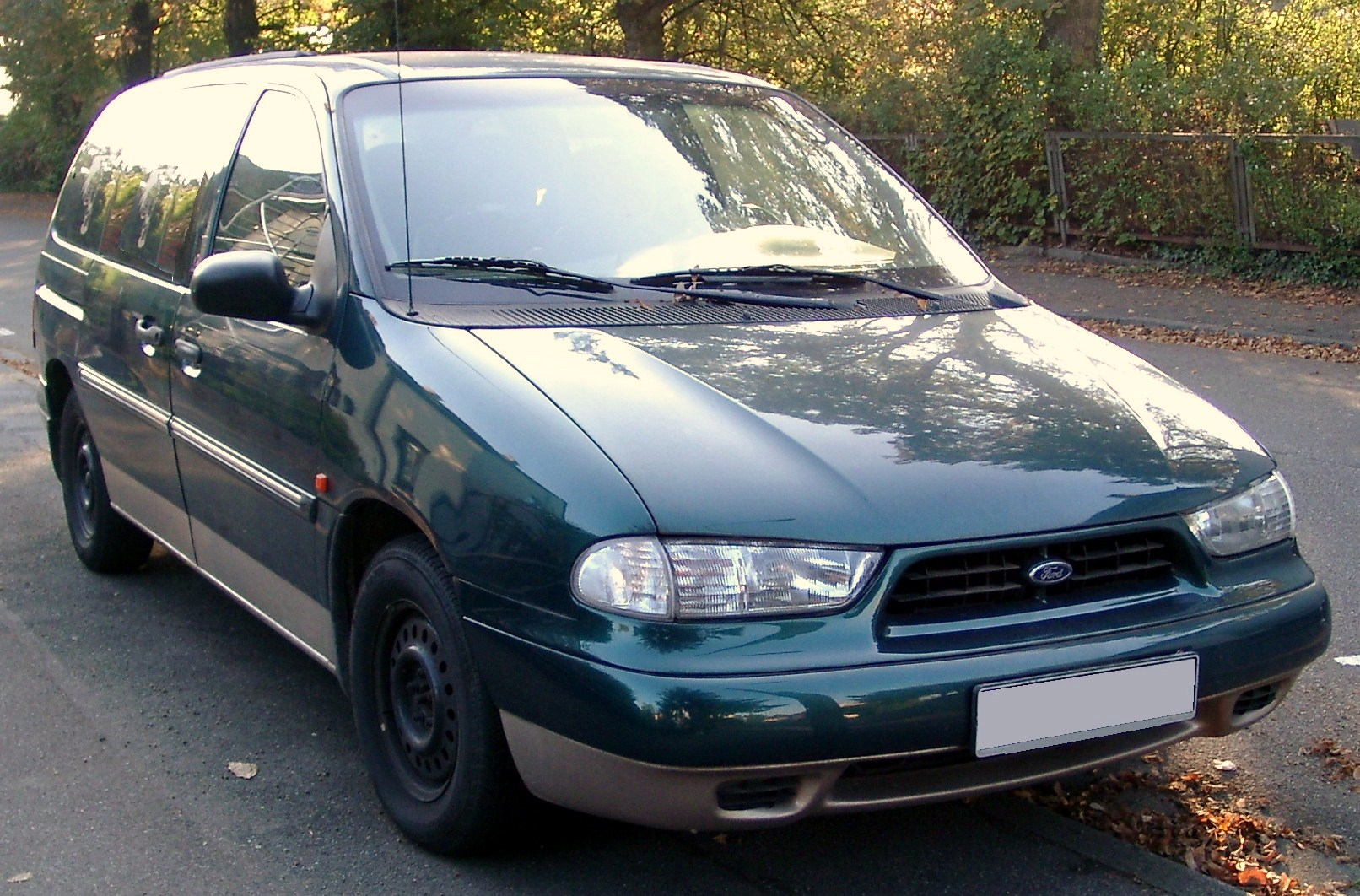 Ford Windstar, 1. Generation